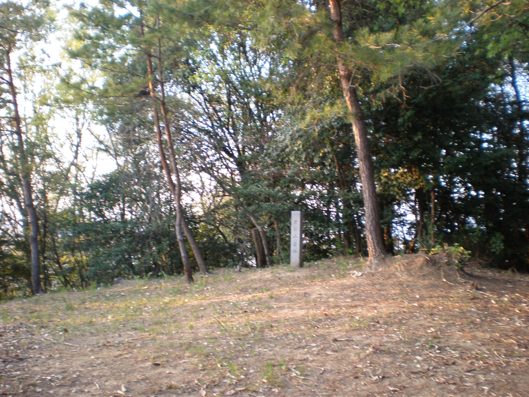 愛知県小牧市久保一色の熊野神社にある久保山砦跡